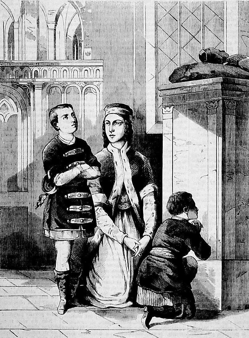 Teofila Sobieska z synami Markiem i Janem